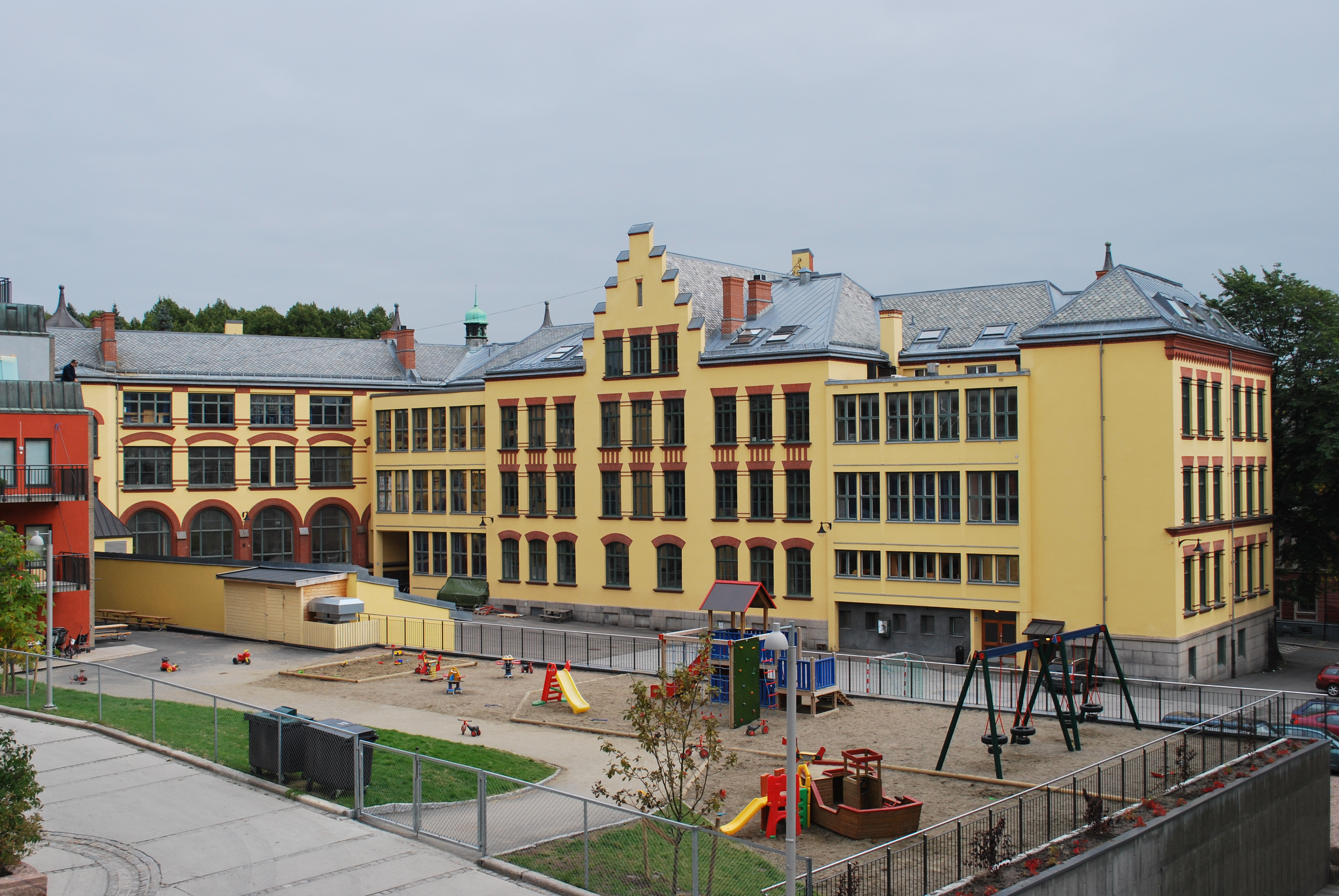 Oslo katedralskole, Oslo, sett fra Pilestredet park (nordvest)